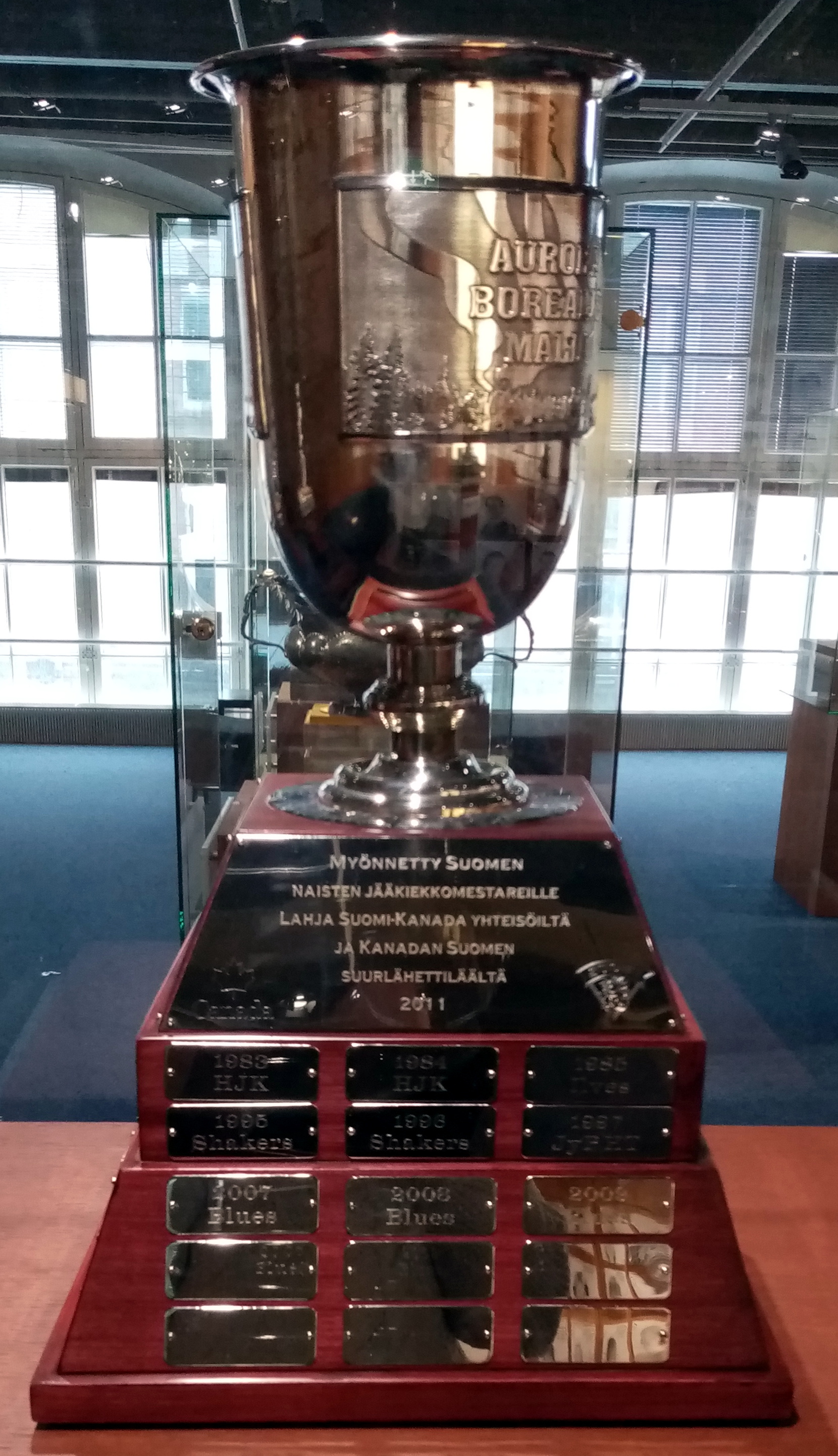 A Aurora Borealis Malja, trofeo ao equipo campión de Finlandia de hóckey sobre xeo en categoría feminina. Suomen Jääkiekkomuseo, Tampere.